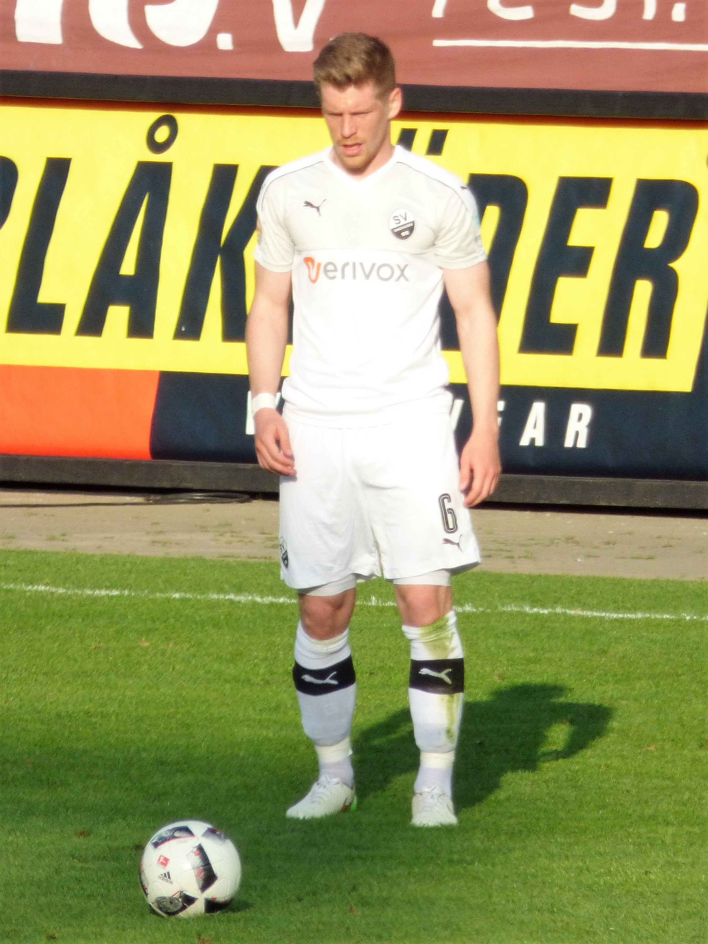 Denis Linsmayer im Trikot des SV Sandhausen